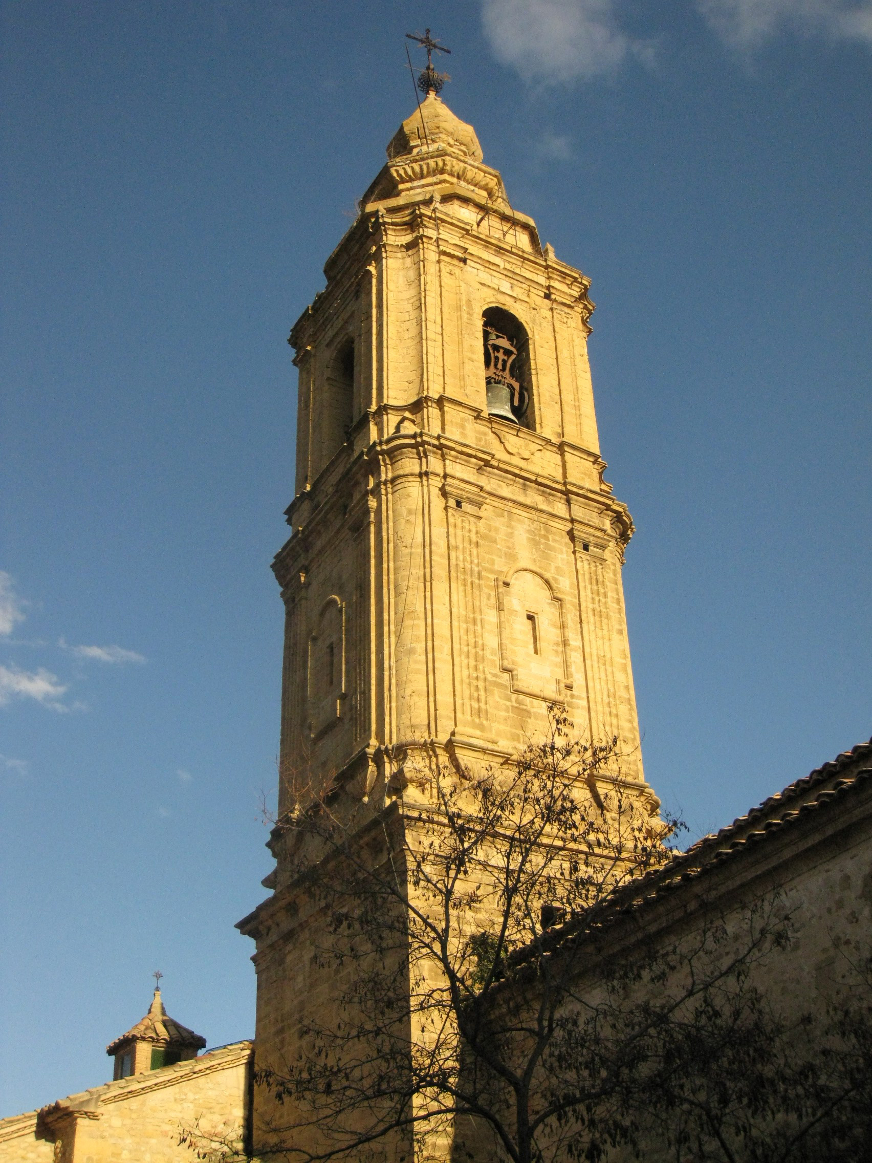 Església parroquial de l'Assumpció (Forcall) 01.061-007.